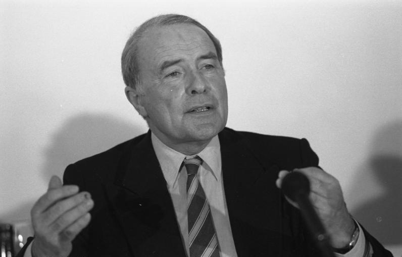 03.02.1983 Friedenskongreß der CDU im Konrad-Adenauer-Haus, Bonn.